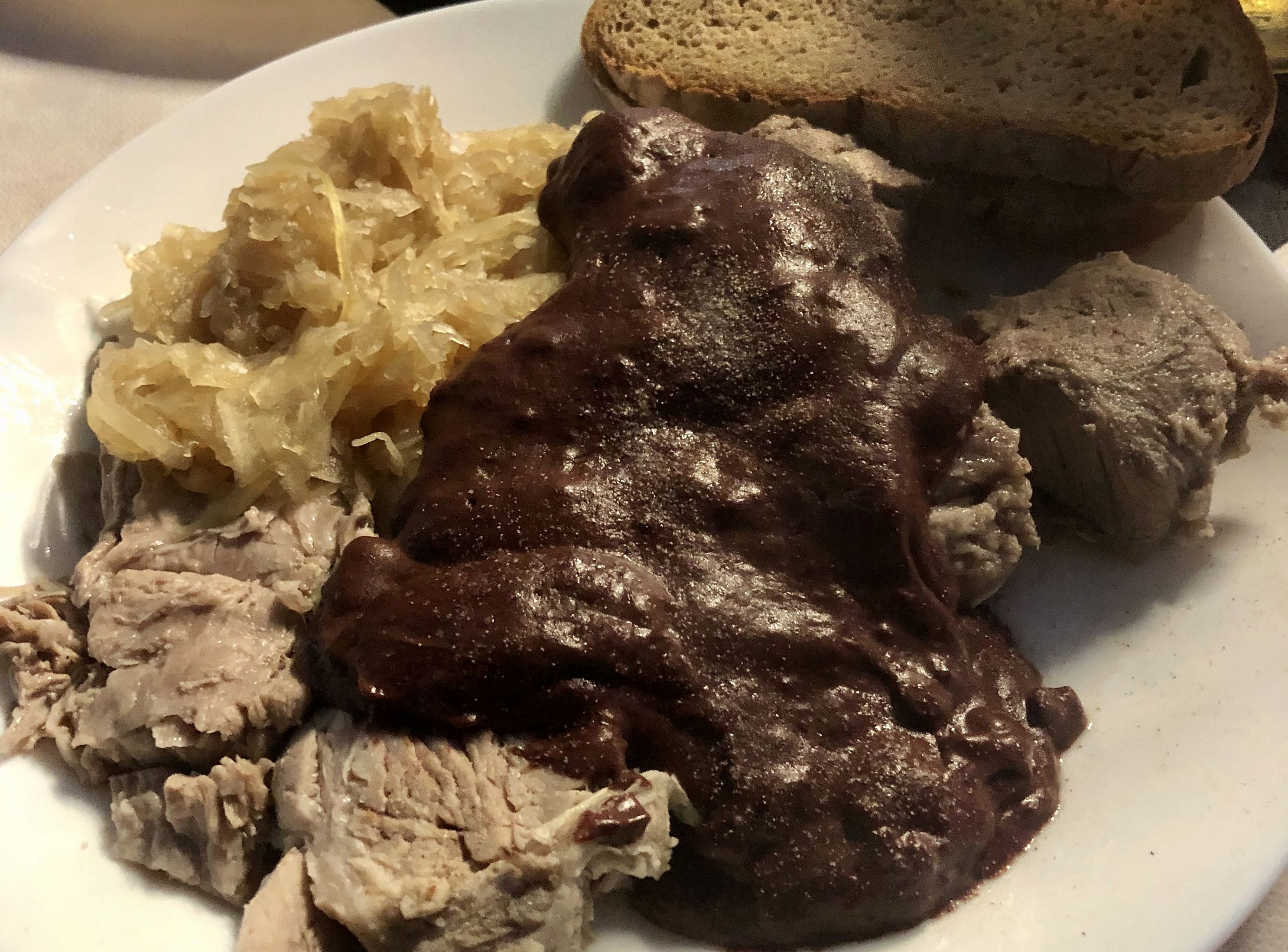 Schweinepfeffer mit Kesselfleisch und Sauerkraut; regionale Küche Südhessen und Kurpfalz